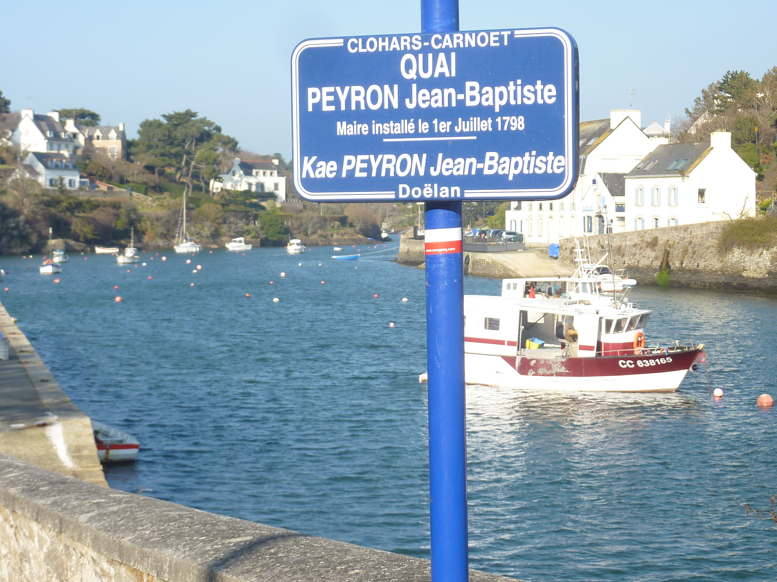 Clohars-Carnoët : le quai Jean-Baptiste Peyron à Doëlan.